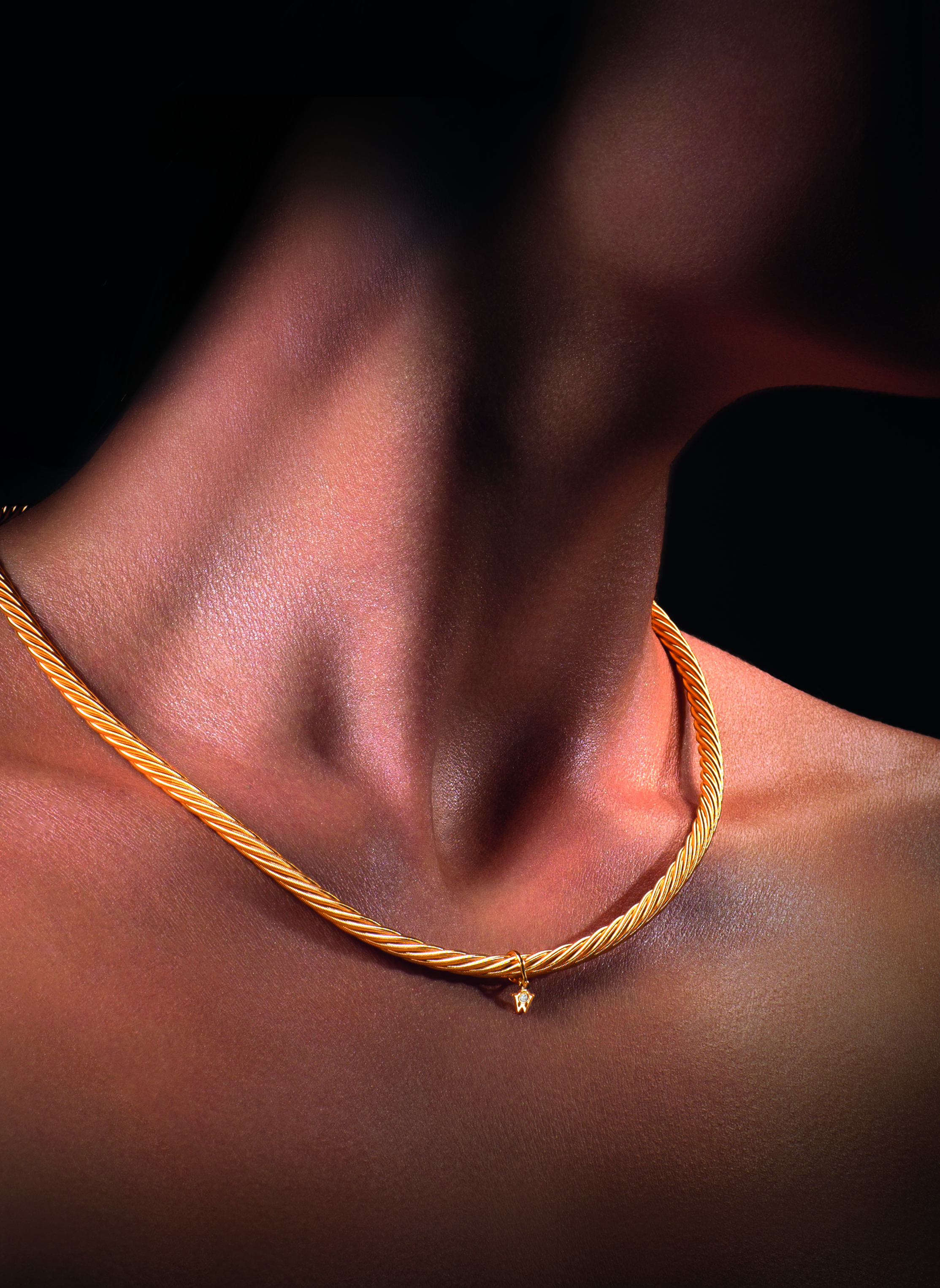 Für das Collier PRINZESSE wurden sieben Goldkordeln miteinander verflochten.